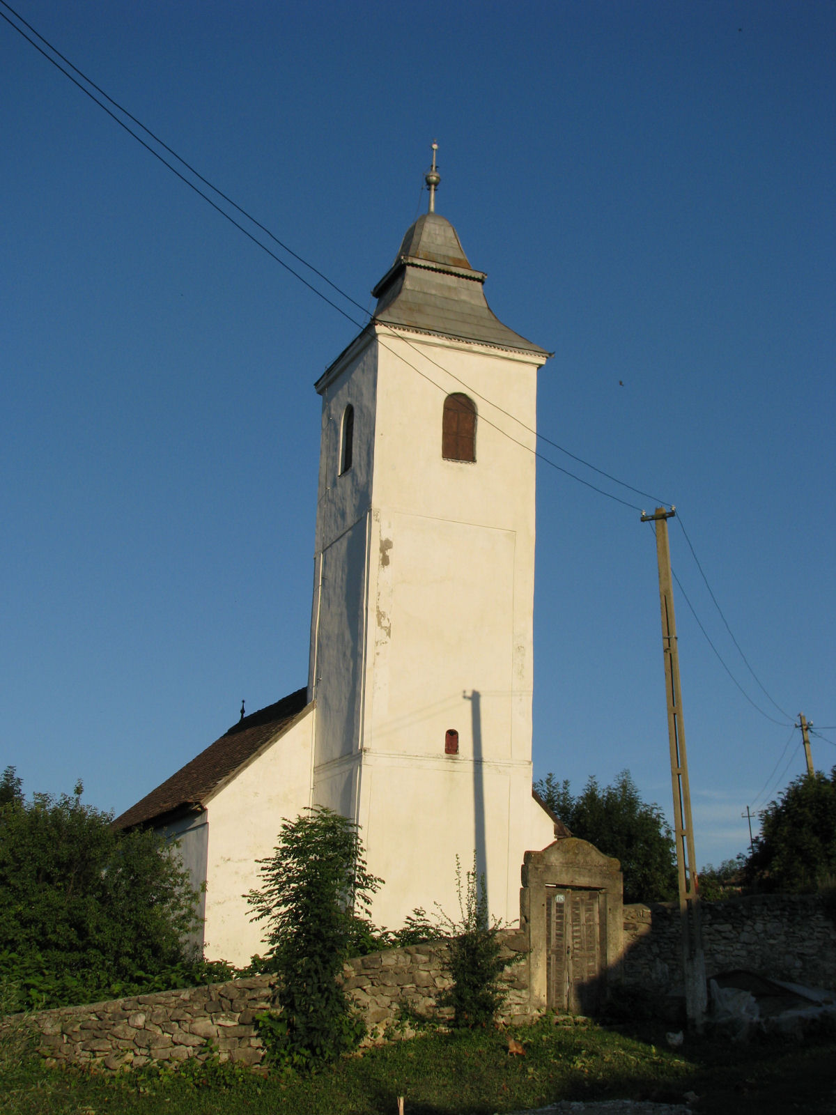 Biserica Unitariană din Sănduleşti, judetul Cluj, Romania